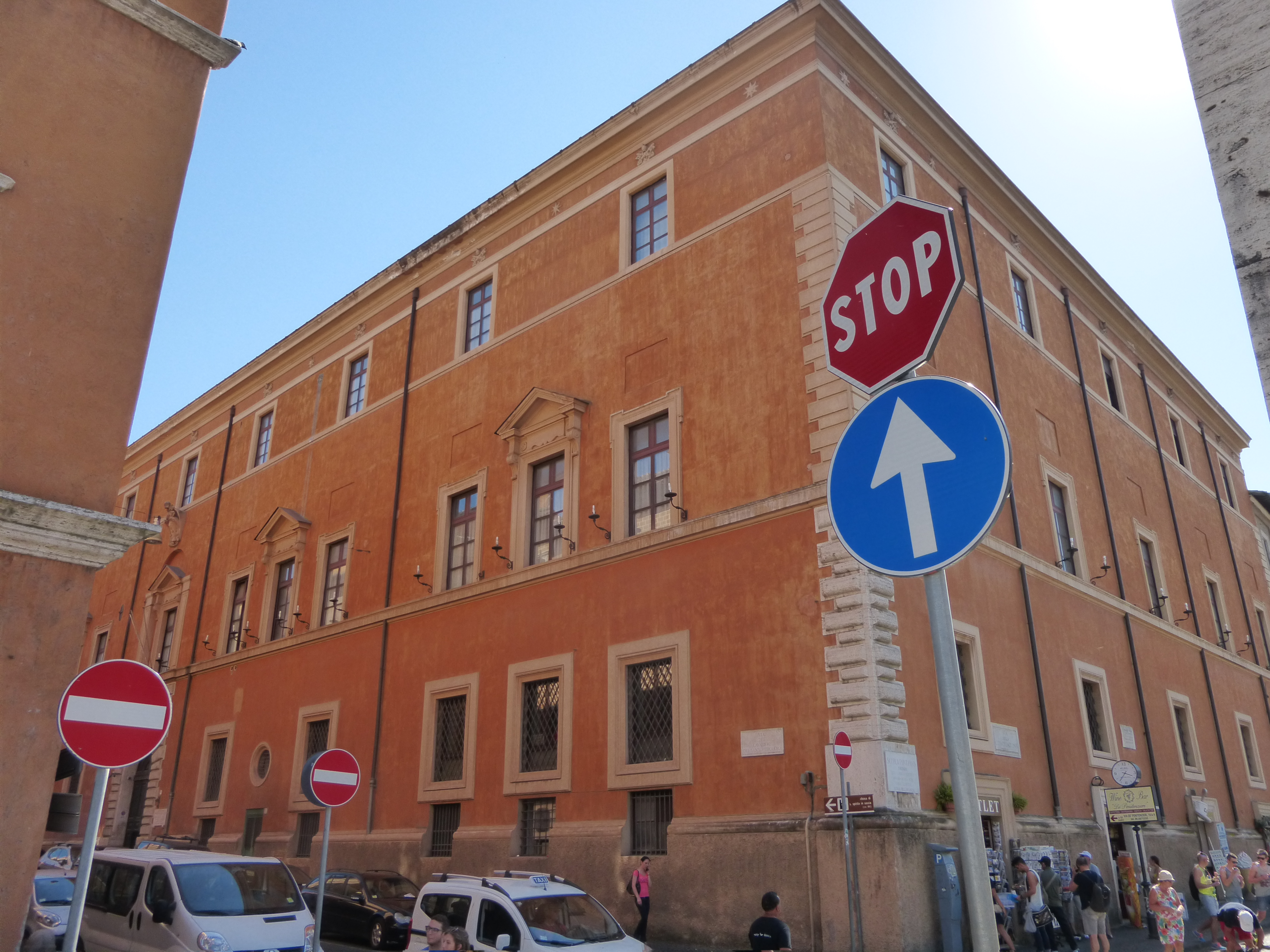 Roma, palazzo Serristori, angolo via dei cavalieri del S. Sepolcro - via della Conciliazione.